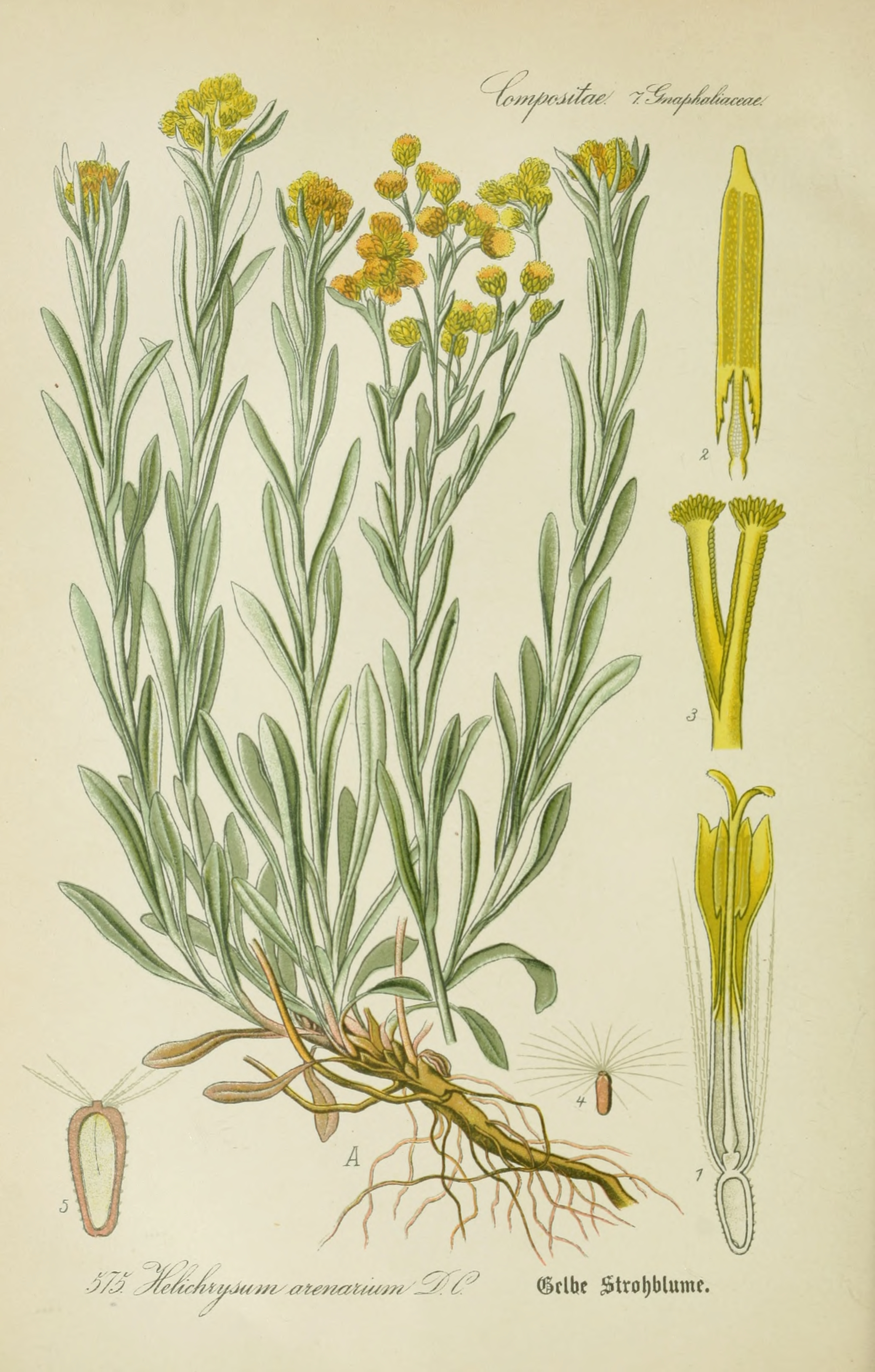 Legende: A Ganze Pflanze. 1 Röhrenblüte, Längsschnitt. 2 Staubblatt. 3 Griffelspitze. 4 Frucht. 5 Frucht, Längsschnitt. (1-5 vergr.).